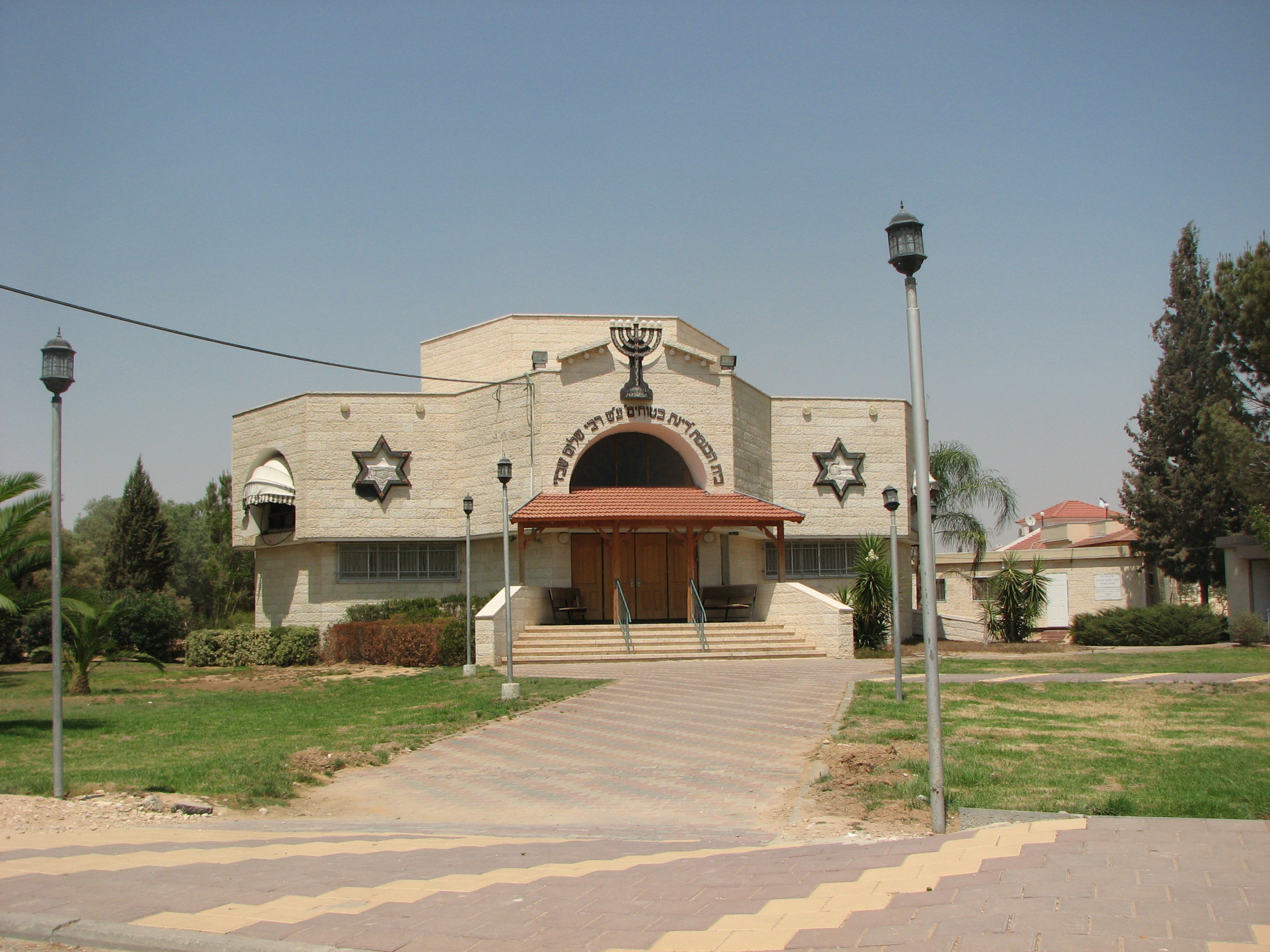 בית הכנסת המרכזי במושב he:בטחה שבצפון הנגב